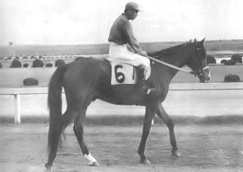 タカオー（菊花賞出走時）